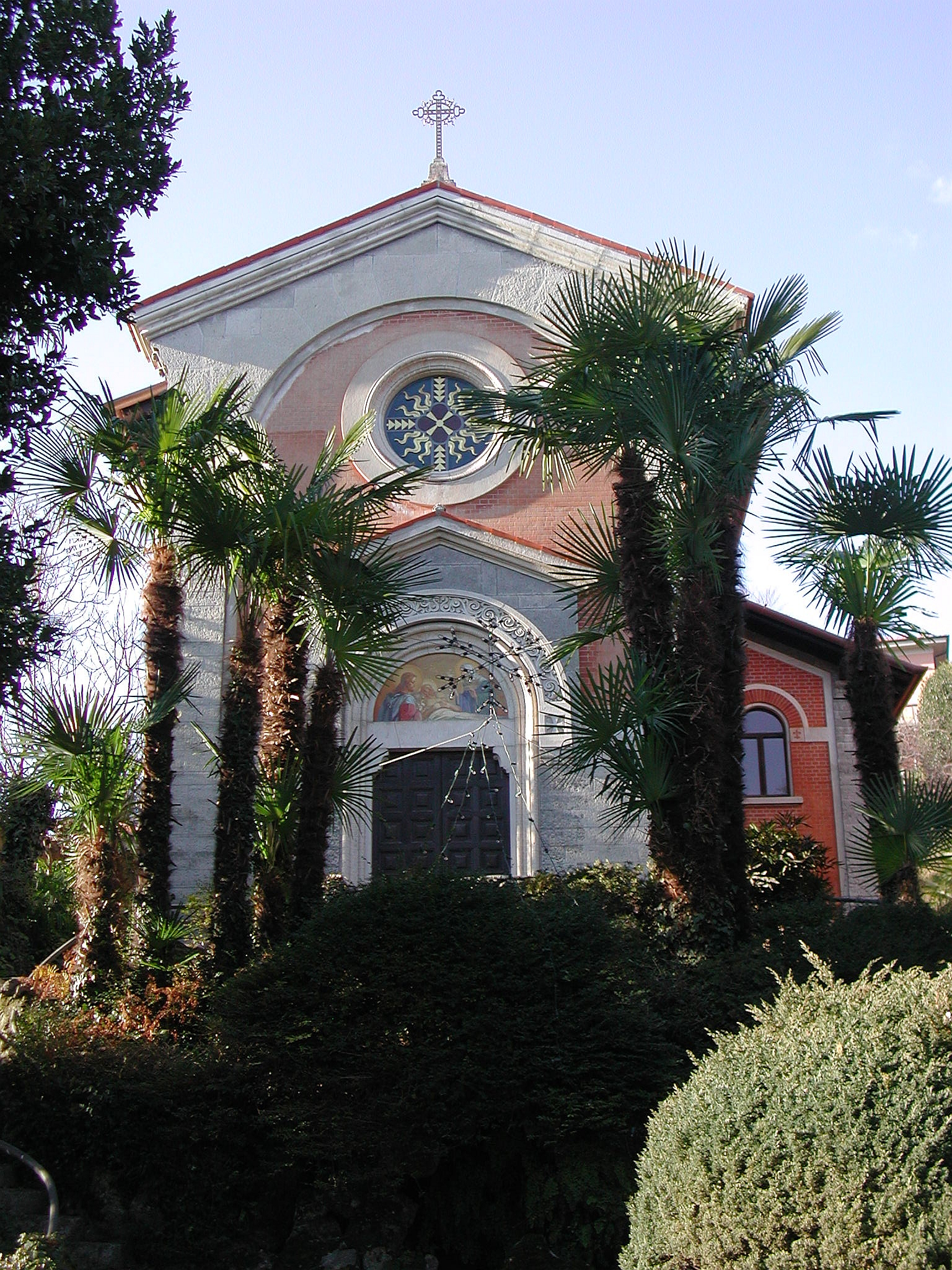 Kirche in Cadenabbia-Griante.